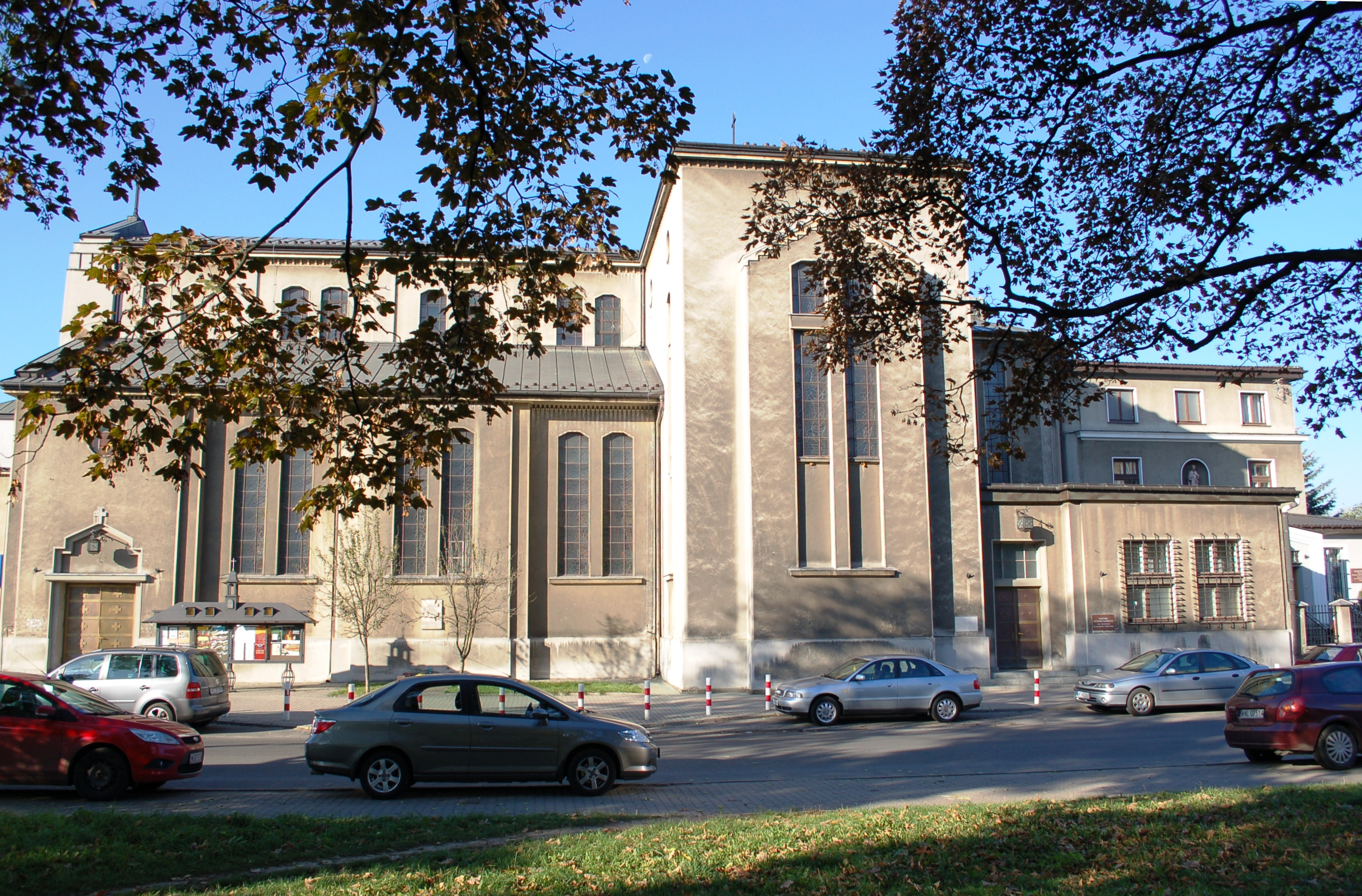 Wola Warschau